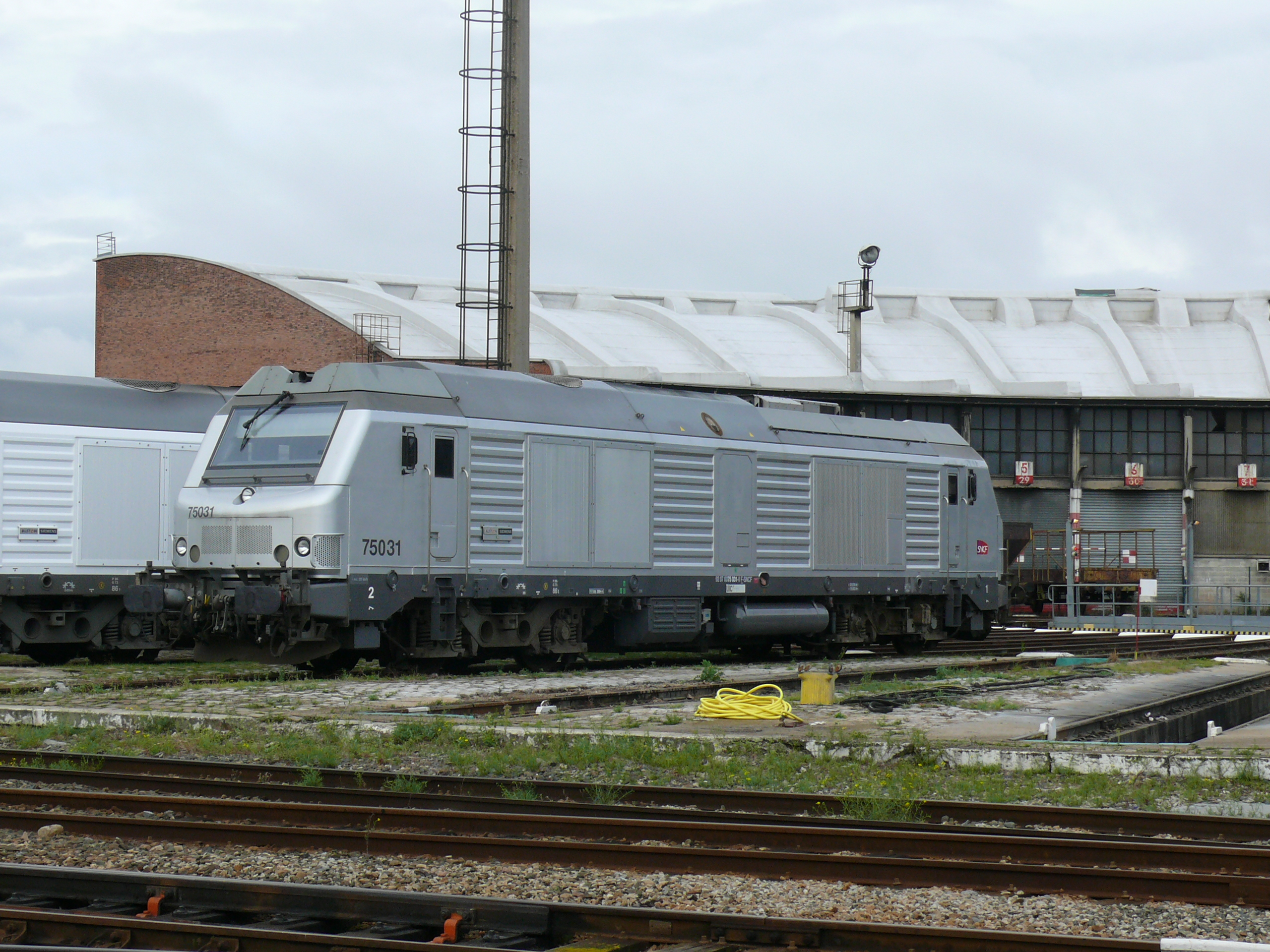 Journées portes ouvertes au dépôt de Longueau de 5 et 6 octobre 2013 : BB 75031 devant la rotonde de Longueau.